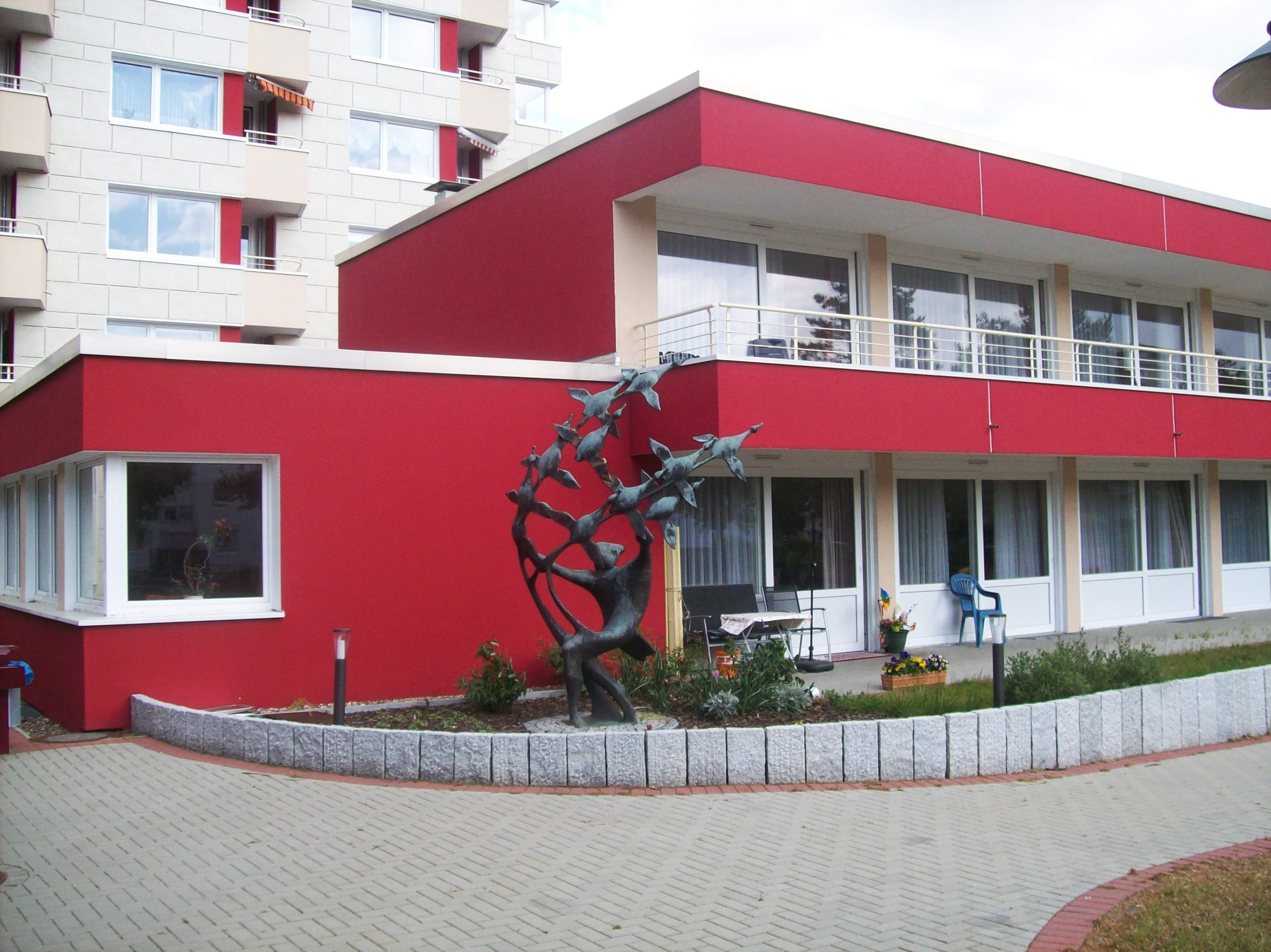 Seniorenwohnanlage am Rehrstieg 44, Neuwiedenthal, Hamburg-Hausbruch und Bronzeskulptur Münchhausen aus dem Jahre 1977 von Gisela Engelin-Hommes. (In: Heinz Zabel: Plastische Kunst in Hamburg – Skulpturen und Plastiken im öffentlichen Raum, 2. Auflage, Dialog-Verlag, Reinbek 1987, ISBN 3-923707-15-0, S. 96 (Foto S. 97) als Münchhausen-Brunnen bezeichnet. Die Skulptur stand in dem Foto des Buches auf einem Sockel an einem Brunnen.)